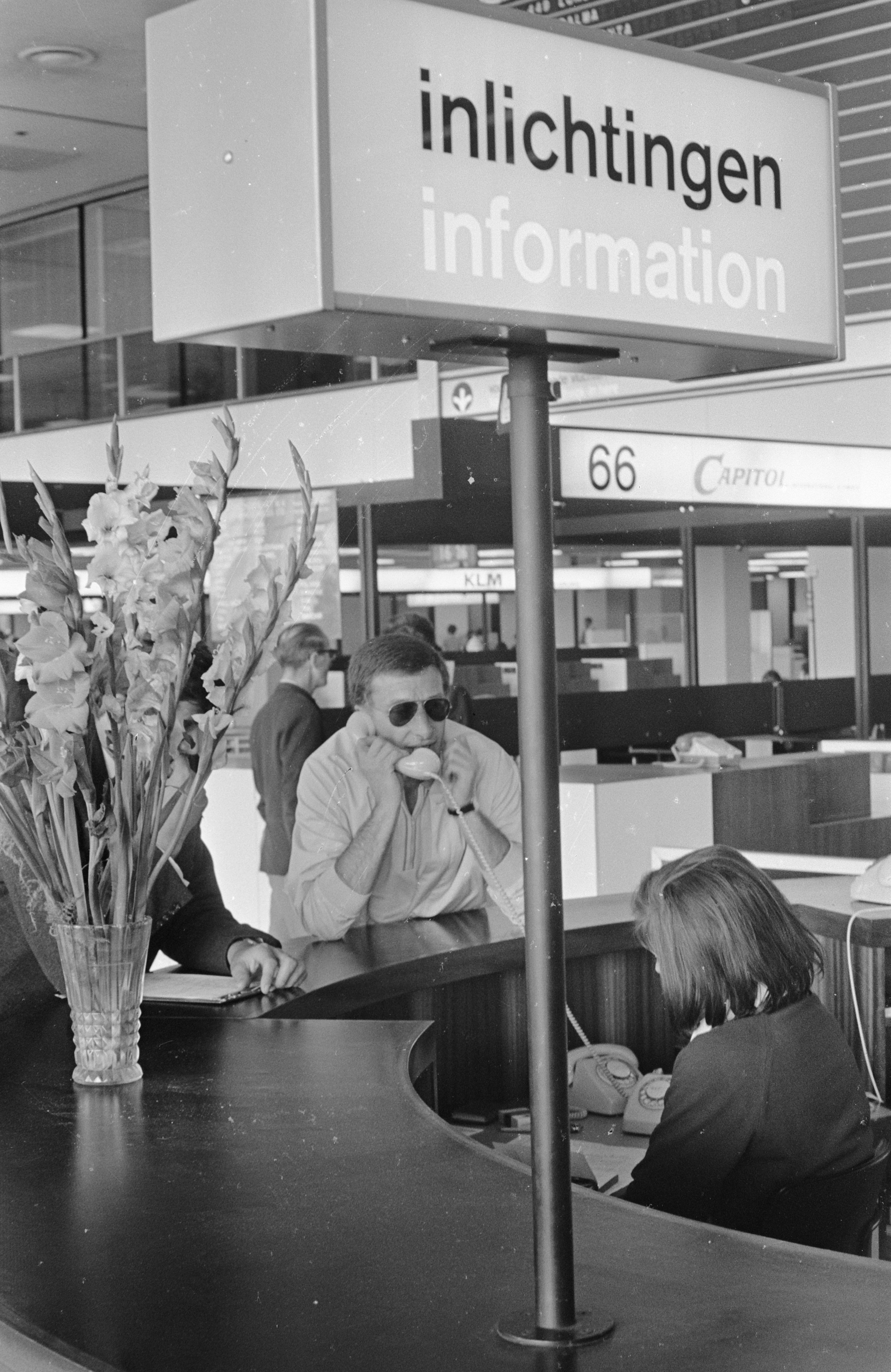 Collectie / Archief : Fotocollectie Anefo Reportage / Serie : [ onbekend ] Beschrijving : Cuba-gangers wachten op vliegtuig in vertrekhal Schiphol. Schrijver Harry Mulisch belt of hij nog een vliegtuig kan krijgen Datum : 26 juli 1968 Locatie : Noord-Holland, Schiphol Trefwoorden : schrijvers, vertrekhallen, vliegtuigen Persoonsnaam : Mulisch, Harry Fotograaf : Kroon, Ron / Anefo Auteursrechthebbende : Nationaal Archief Materiaalsoort : Negatief (zwart/wit) Nummer archiefinventaris : bekijk toegang 2.24.01.05 Bestanddeelnummer : 921-5405